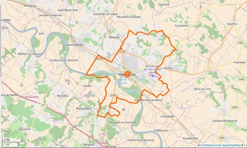 Marmande Limite communale This map may be incomplete, and may contain errors. Don't rely solely on it for navigation.